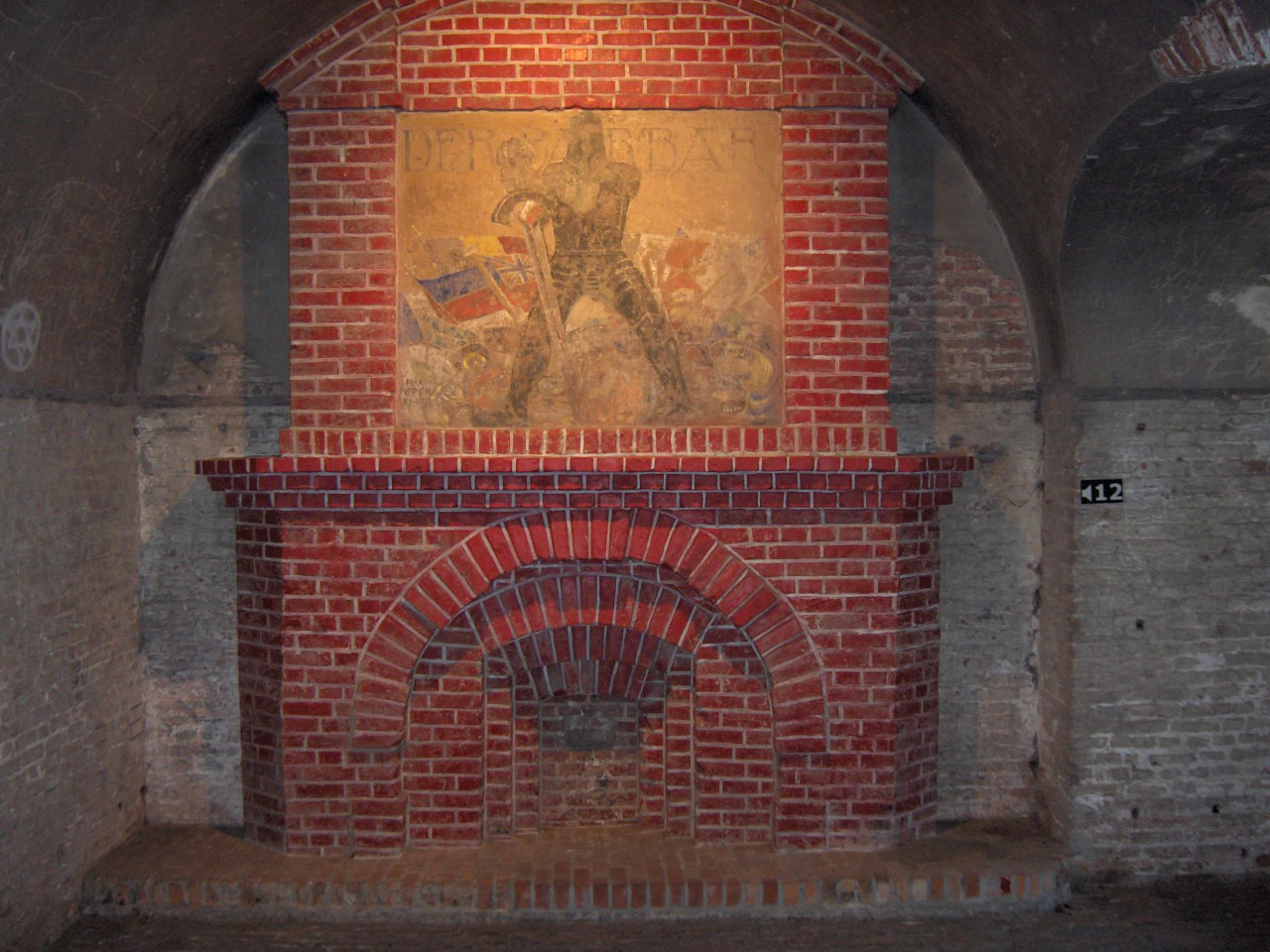 Der Barbar - painting by Heinrich-Otto Pieper, a German soldier during WW I - Fort Napoleon - Ostend, Belgium